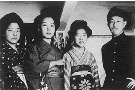 女給、山田ます、伊藤初代、下宿の学生